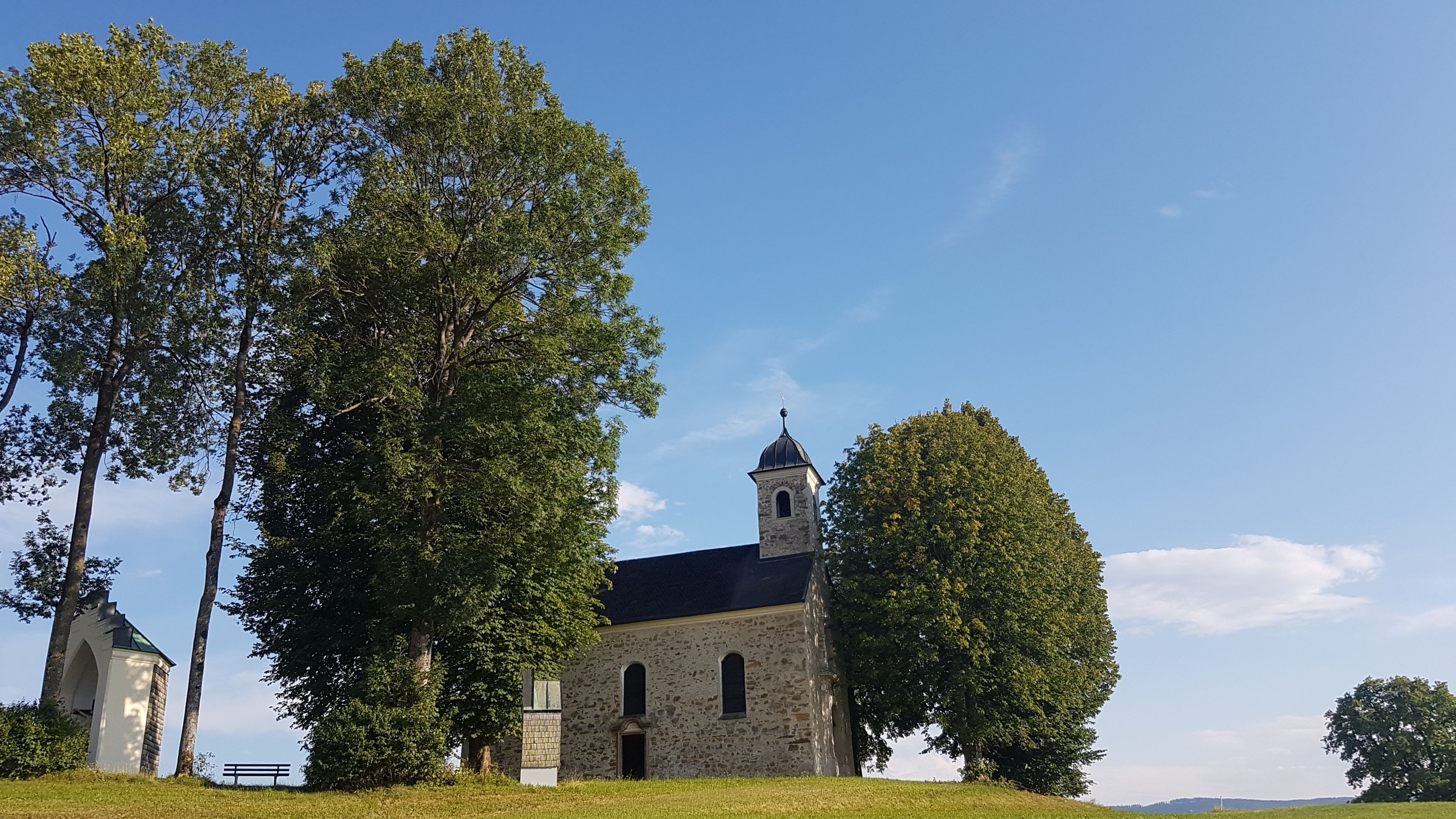 Kalvarienbergkirche in St. Georgen im Attergau und letzte Station des Kreuzwegs, Juli 2018